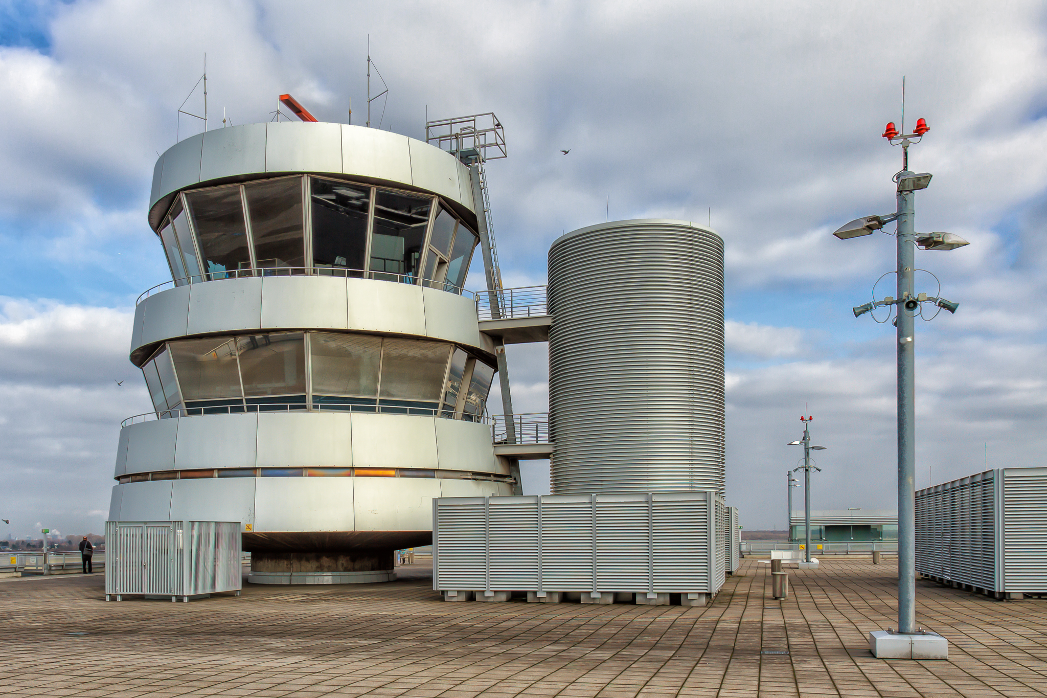 Ehemaliger Tower des Flughafen Düsseldorf International